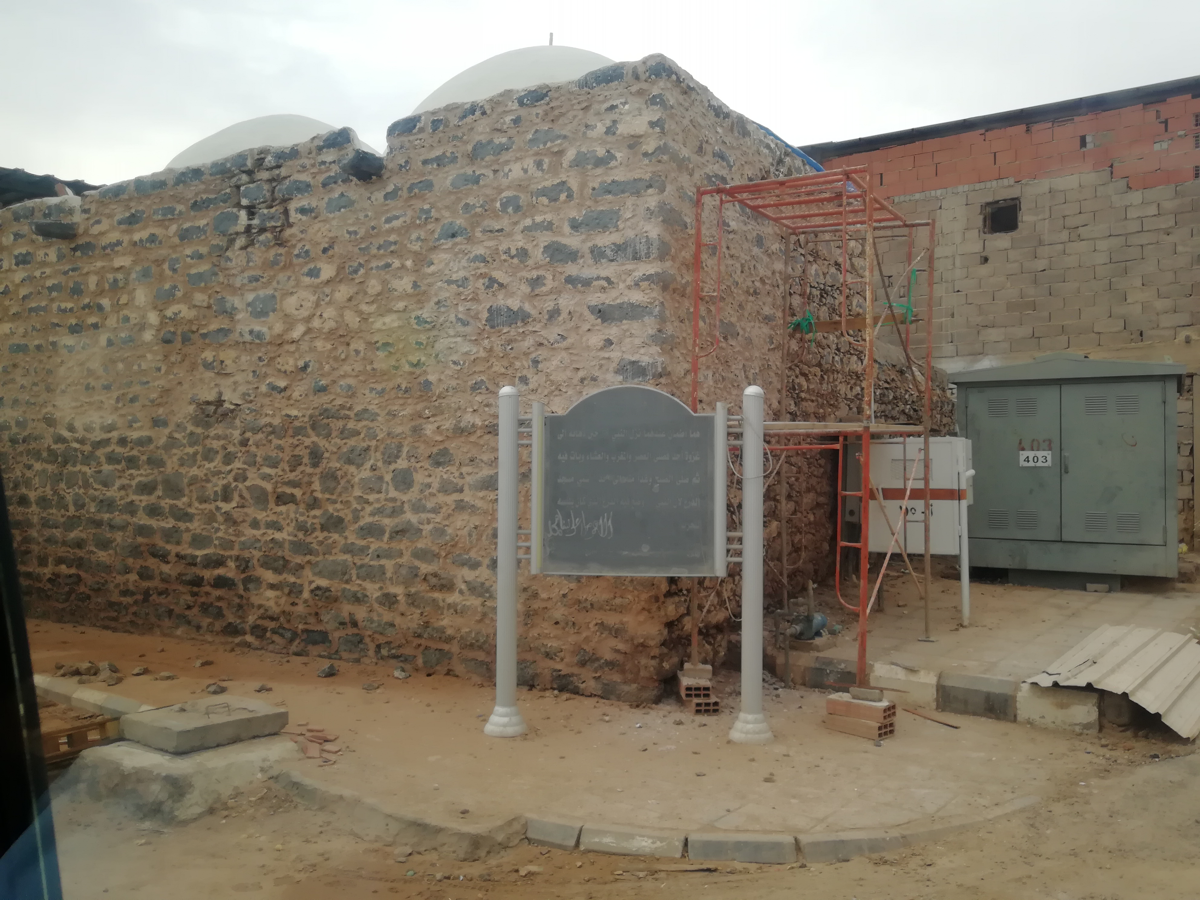 al-Madinah al-Munawarah el-Dera' Mosque مسجد الدرع